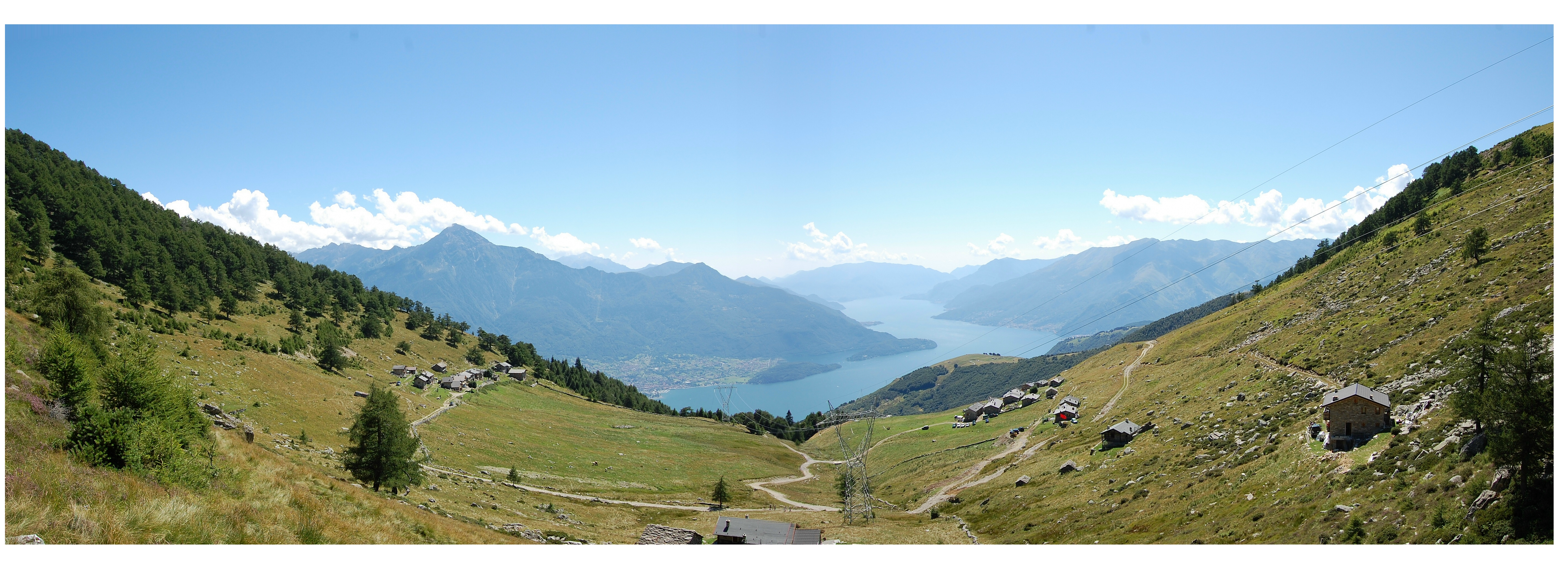 Alpeggio Pescedo ai piedi del Monte Berlinghera (Sorico)